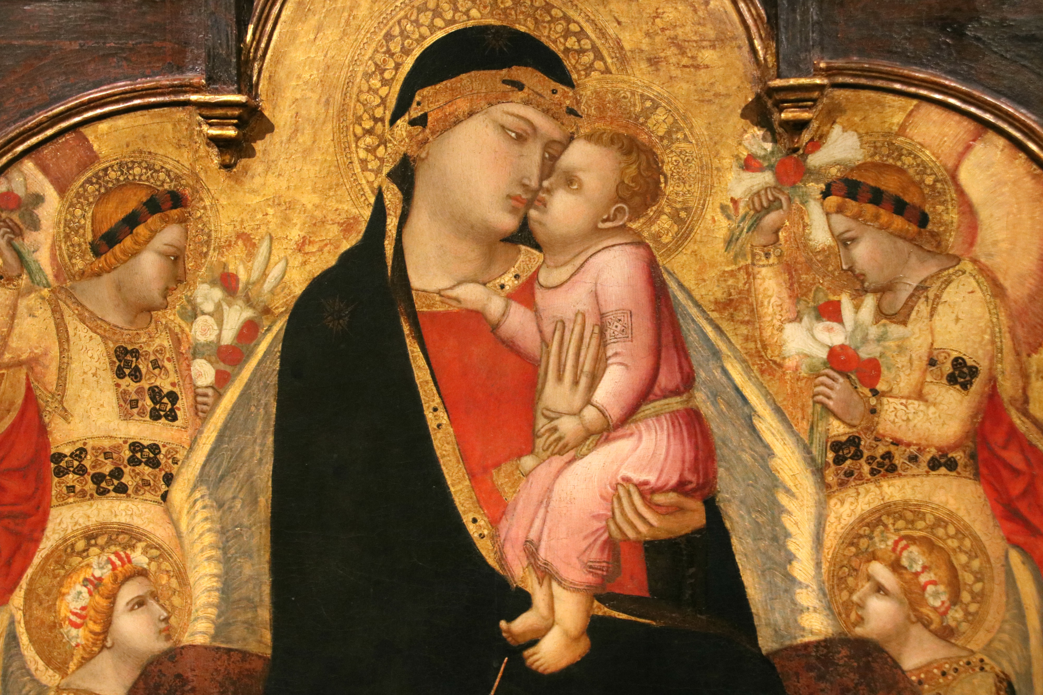 Museo di arte sacra di Massa Marittima This is a photo of a monument which is part of cultural heritage of Italy.